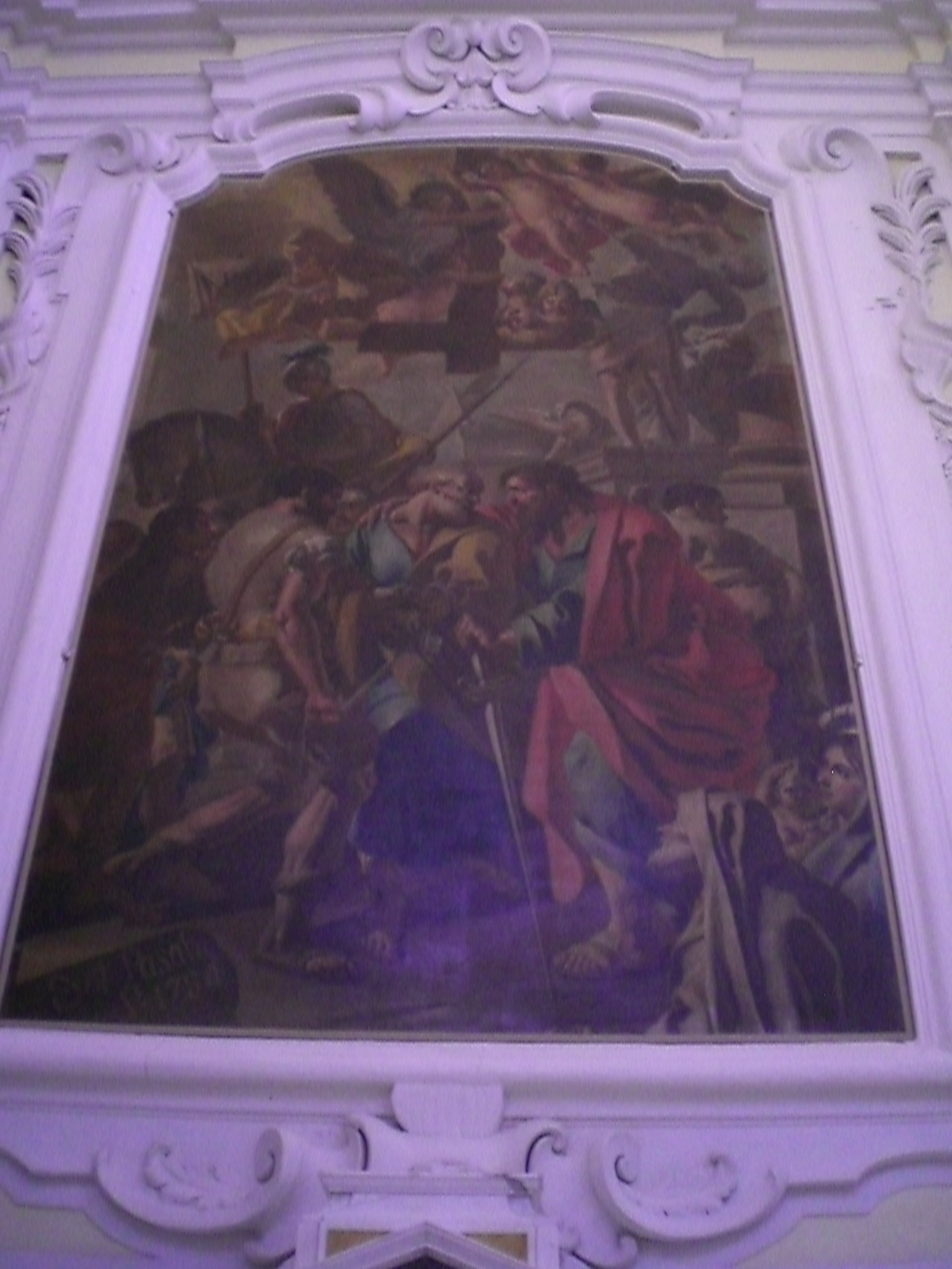 Martirio di San Pietro e San Paolo, tela realizzato nel 1784 da Emanuele Pasabi.